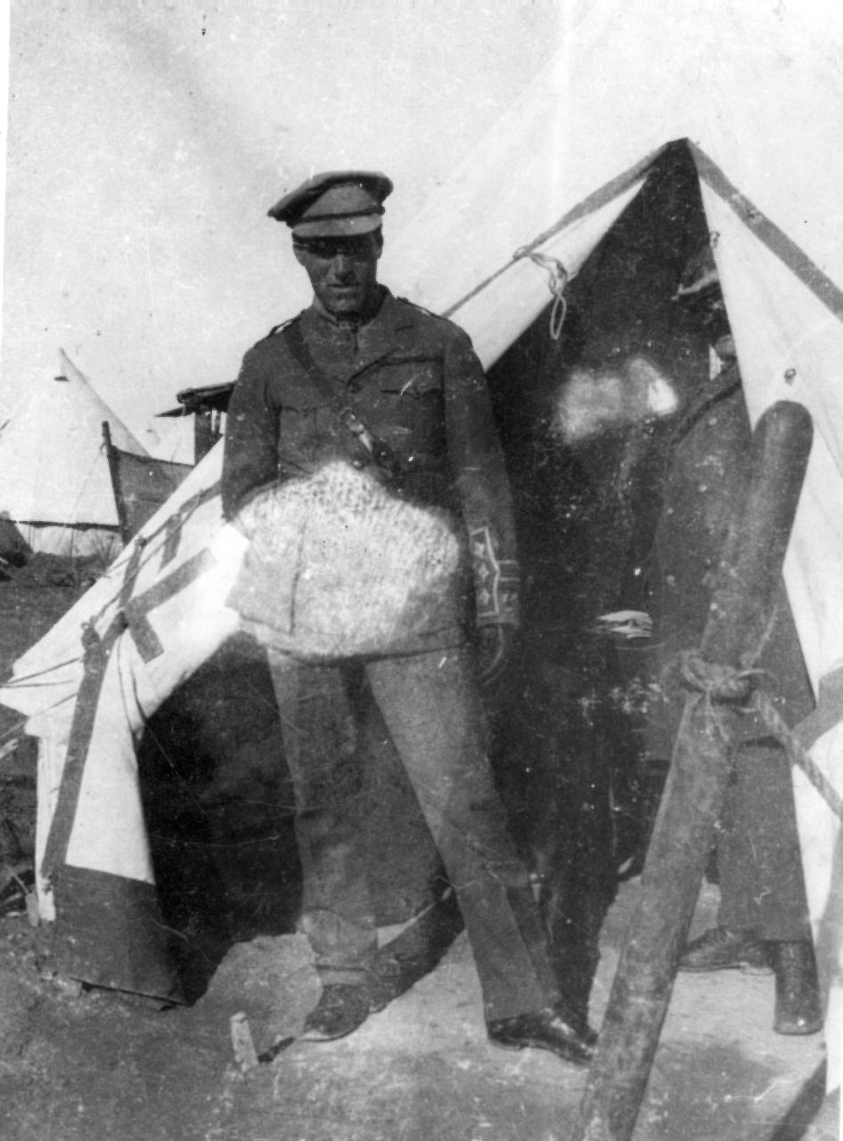 יוסף טרומפלדור במדי קצין בפתח אוהל, מחנה גדוד נהגי הפרדות, גליפולי.